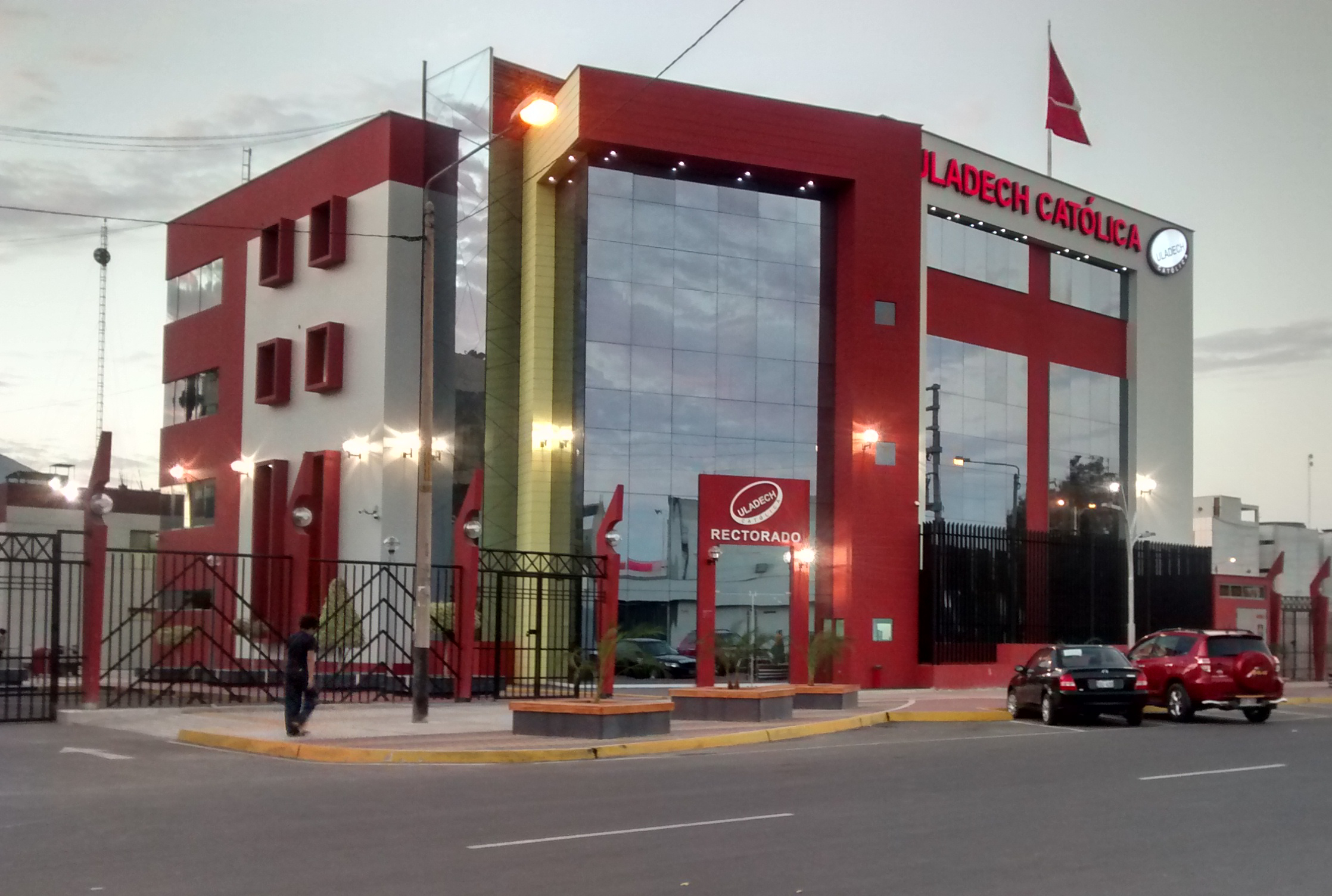 Nuevo local de Rectorado de la Universidad Católica los Ángeles de Chimbote